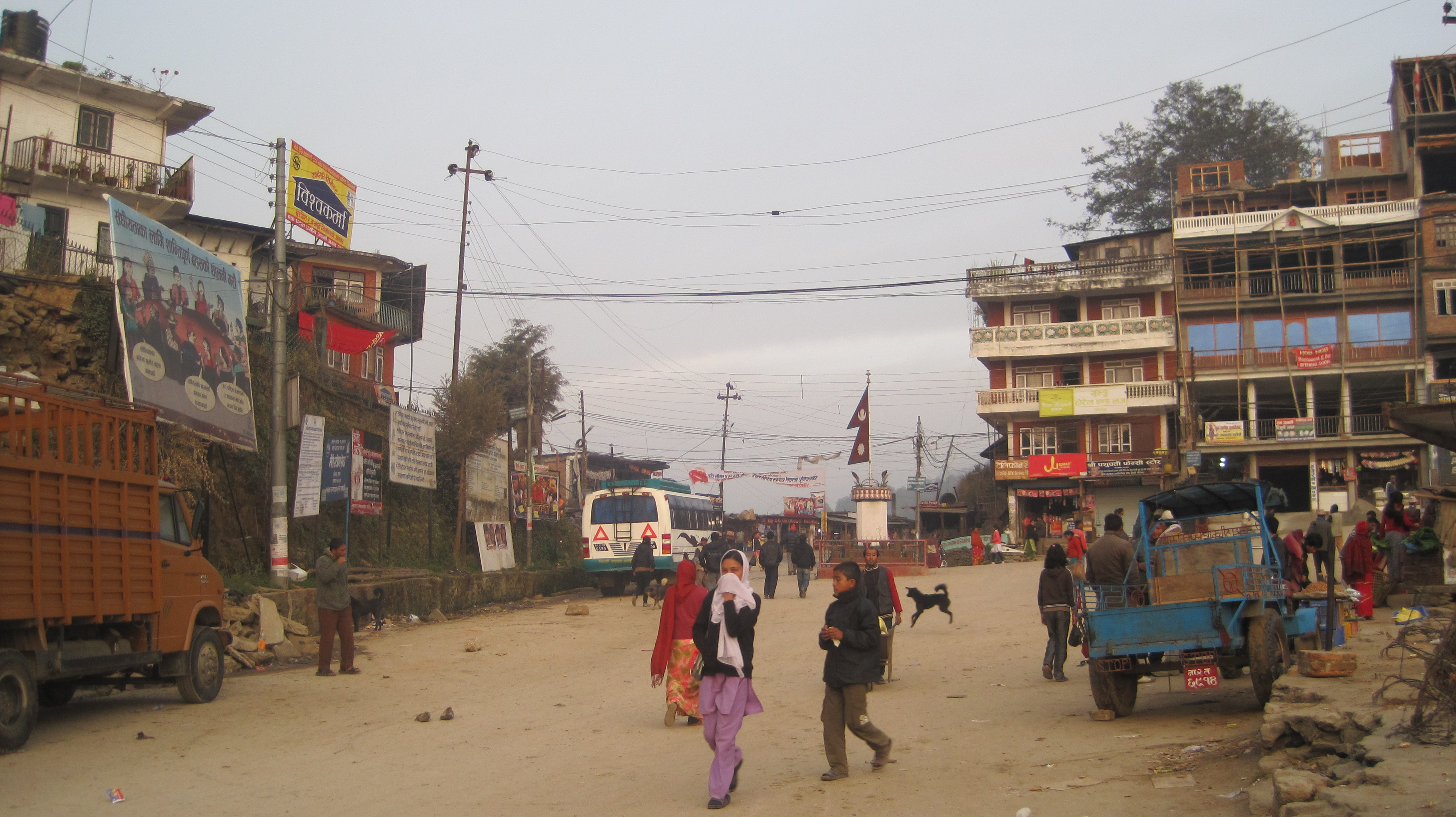 नेपाली: दोलखा जिल्लामा रहेको चरिकोट बजाऱ तस्विर सौजन्य:Punyashori Prajapati